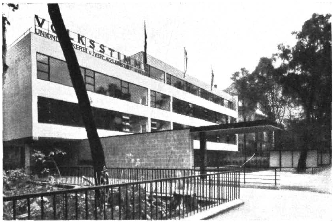 Verwaltungsgebäude der "Volksstimme" in der Bockenheimer Landstraße in Frankfurt a.M.. Errichtet 1929 nach einem Entwurf des Architekten Johann Wilhelm Lehr, zerstört im 2. Weltkrieg.